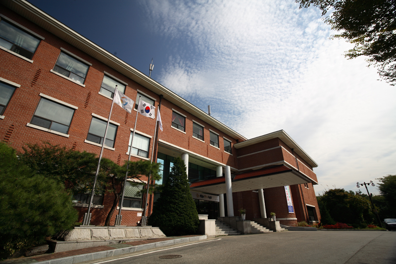 한국식품연구원